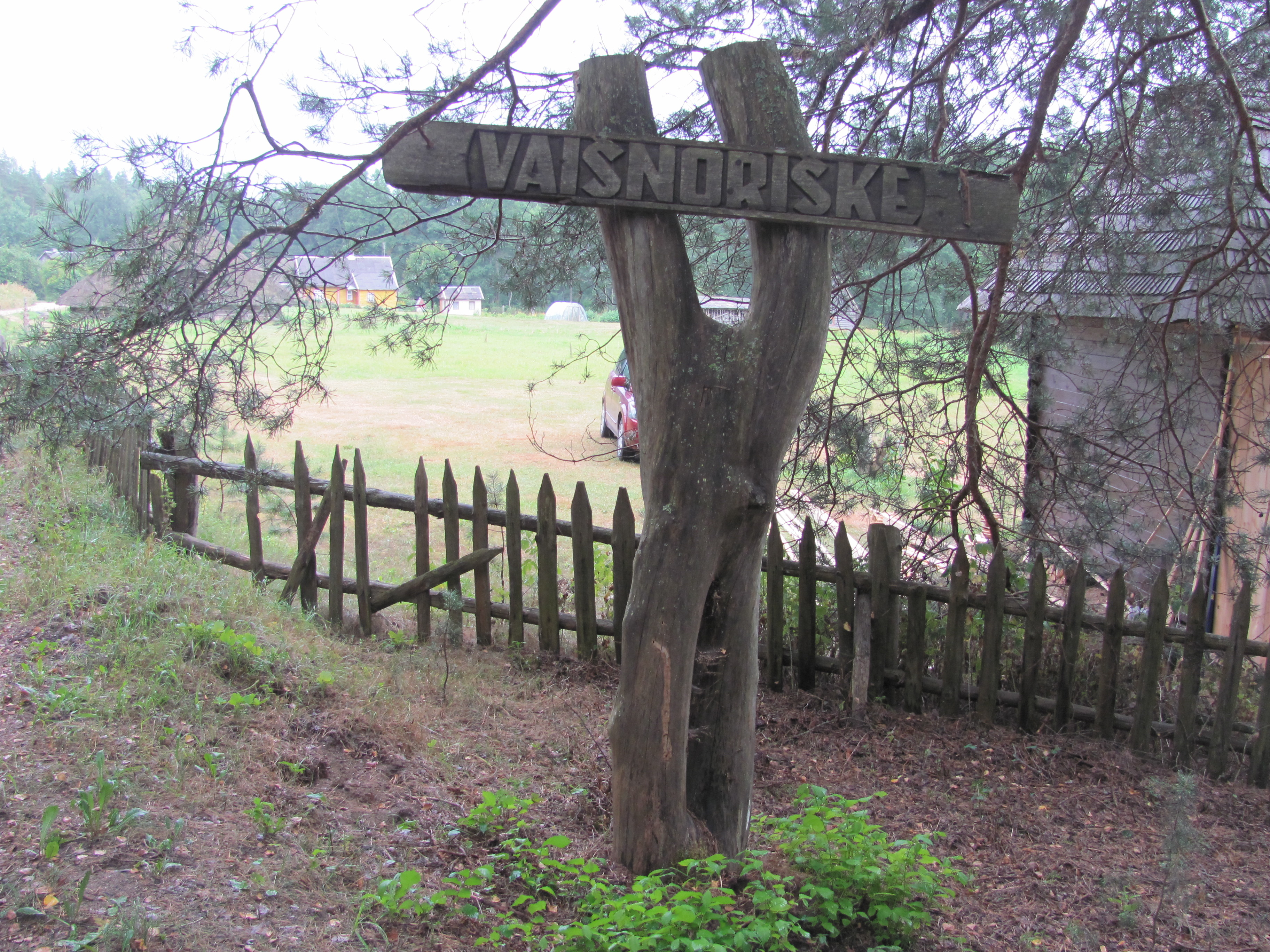 Tauragnų sen., Lithuania